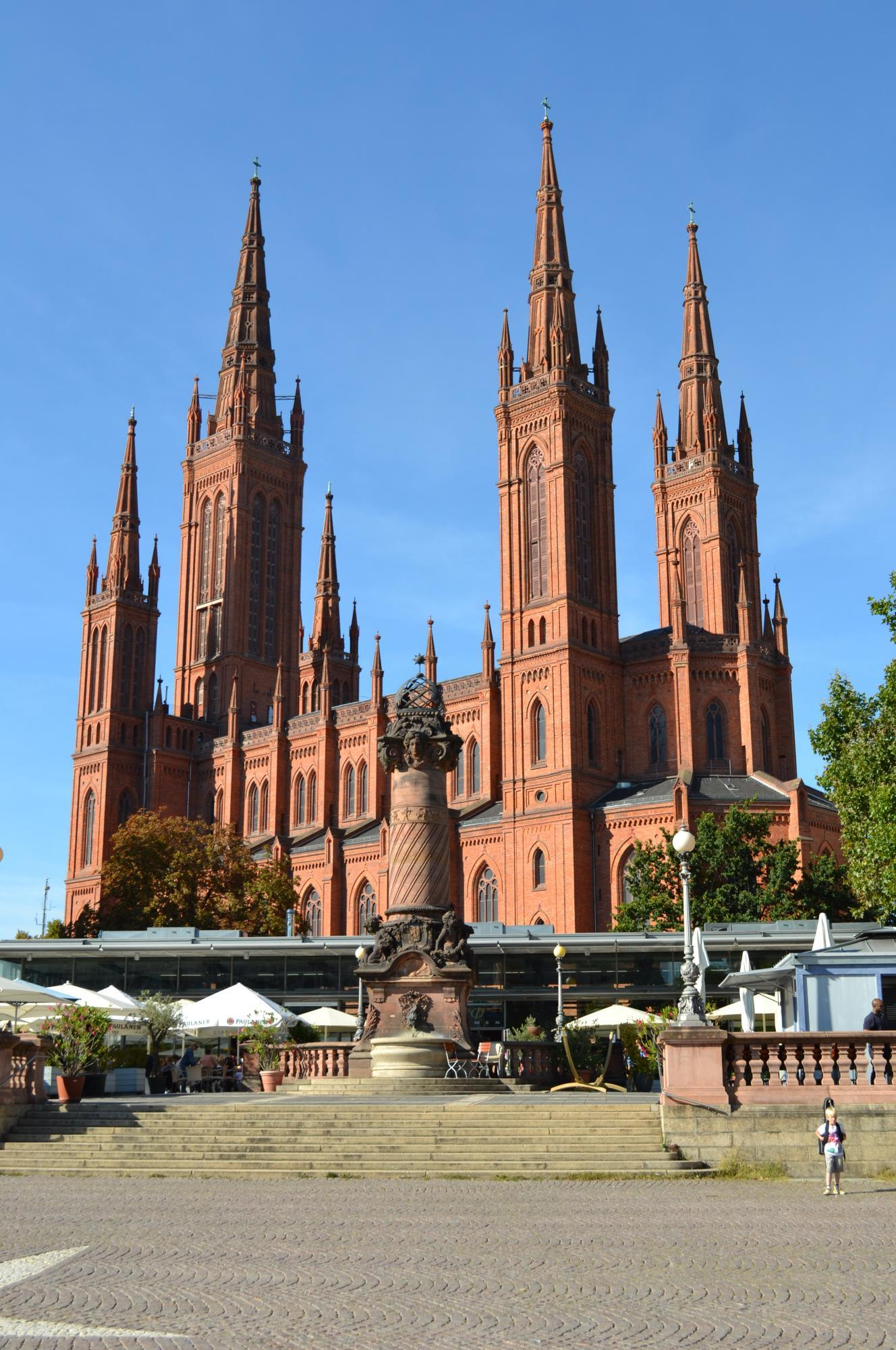 Marktkirche in Wiesbaden